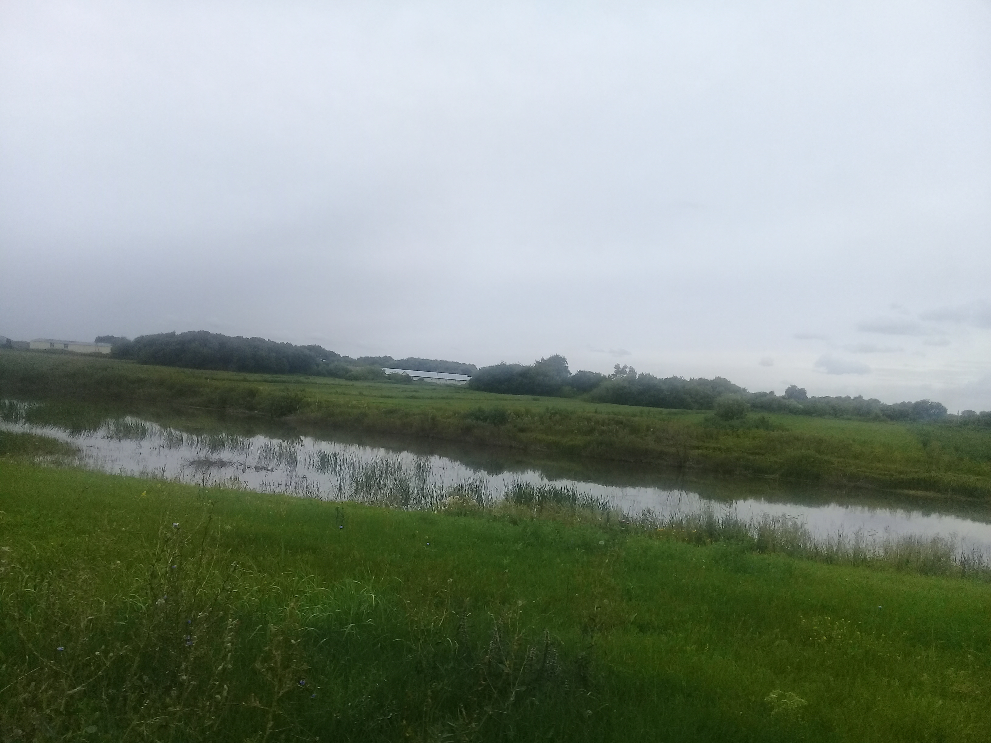 Пруд вблизи деревни Данковка